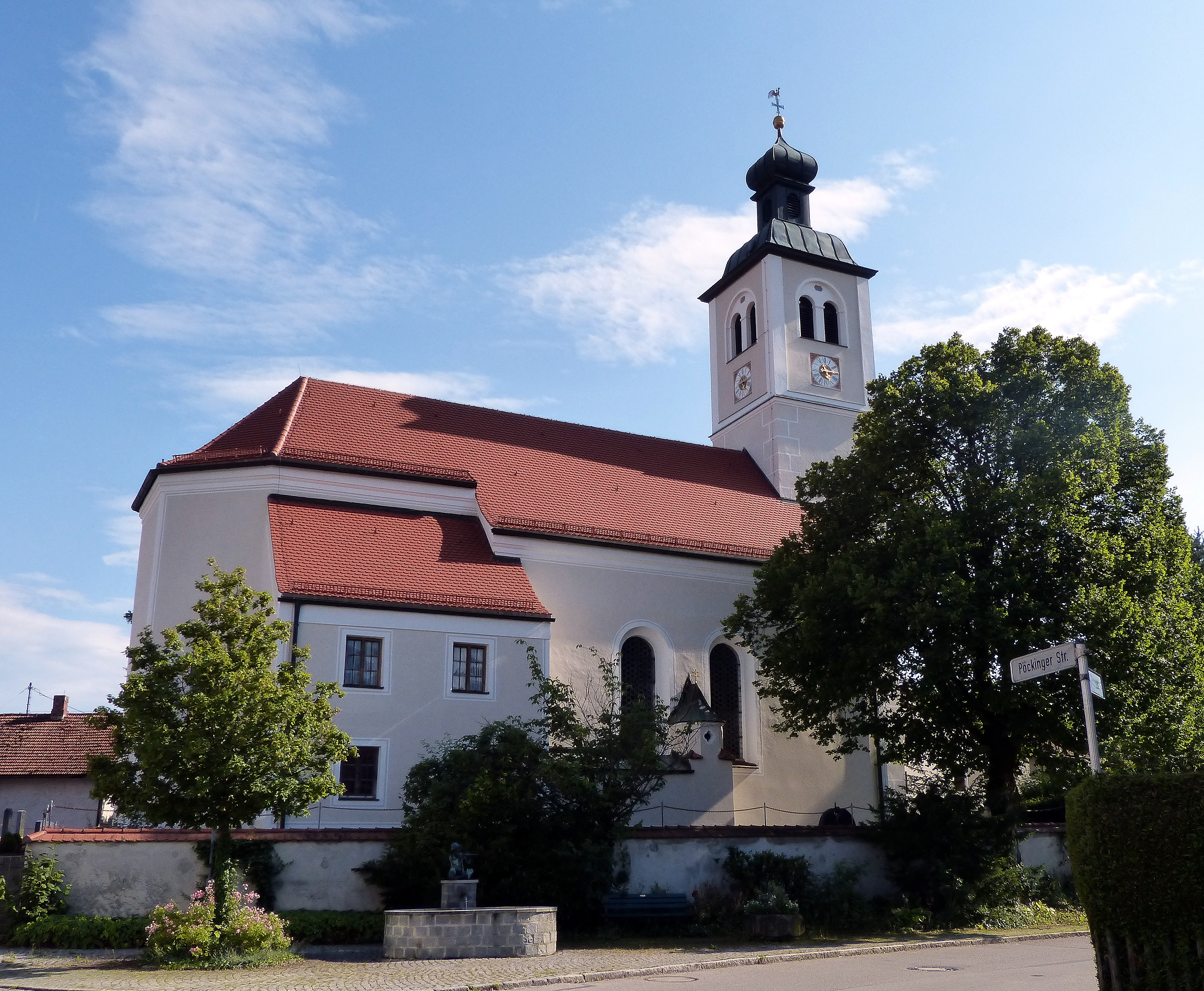 Starnberg, OT Perchting, Kirche Mariä Heimsuchung, Nordseite